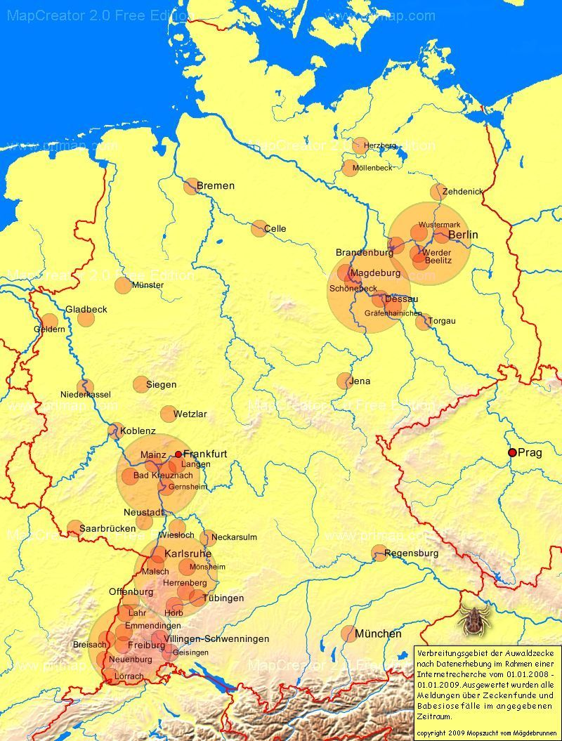 Karte Verbreitungsgebiet der Auwaldzecke (Dermacentor reticulatus) in Deutschland.